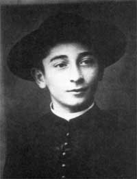 Rolando Rivi (1931-1945), seminarista y mártir italiano.